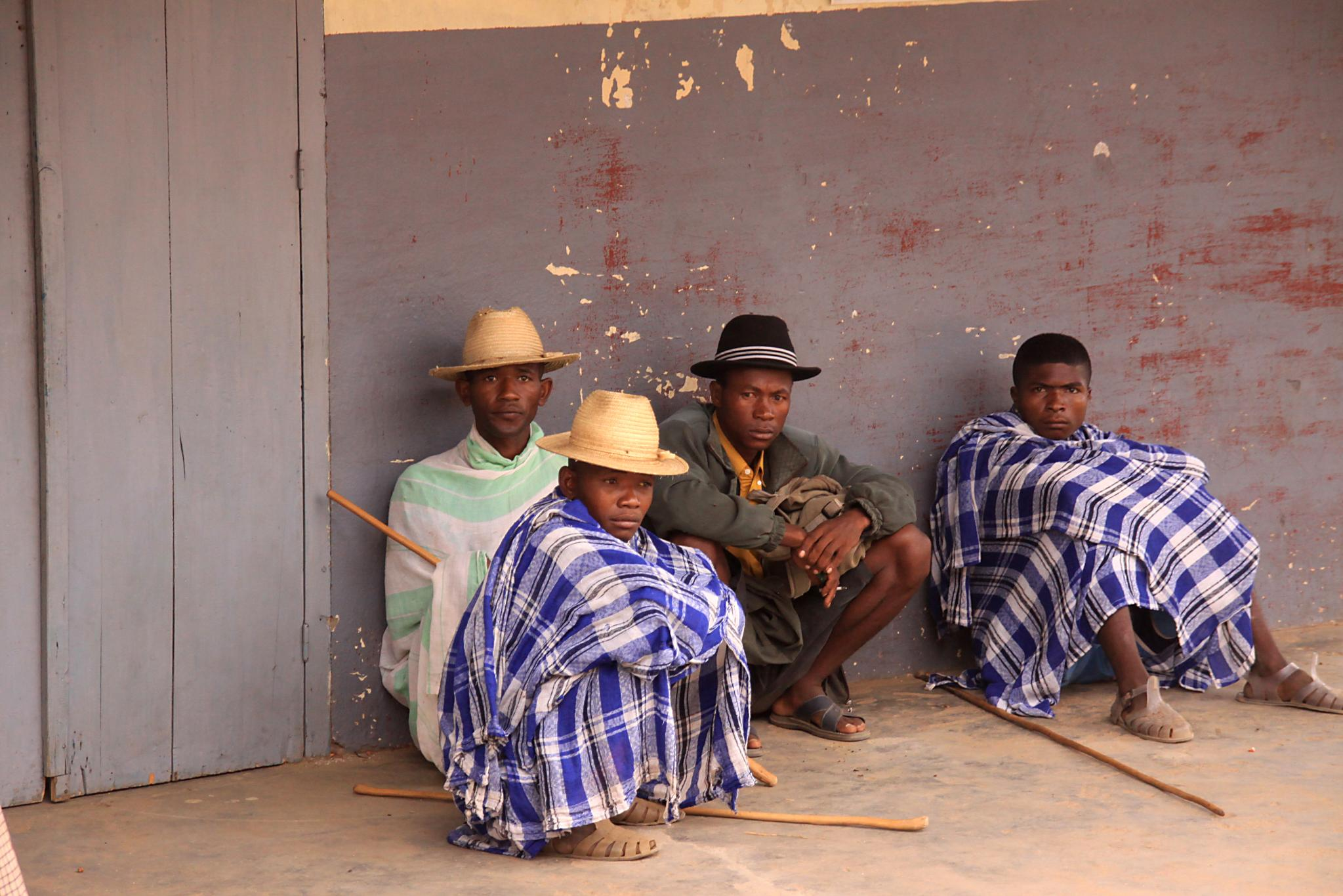 Mahafaly